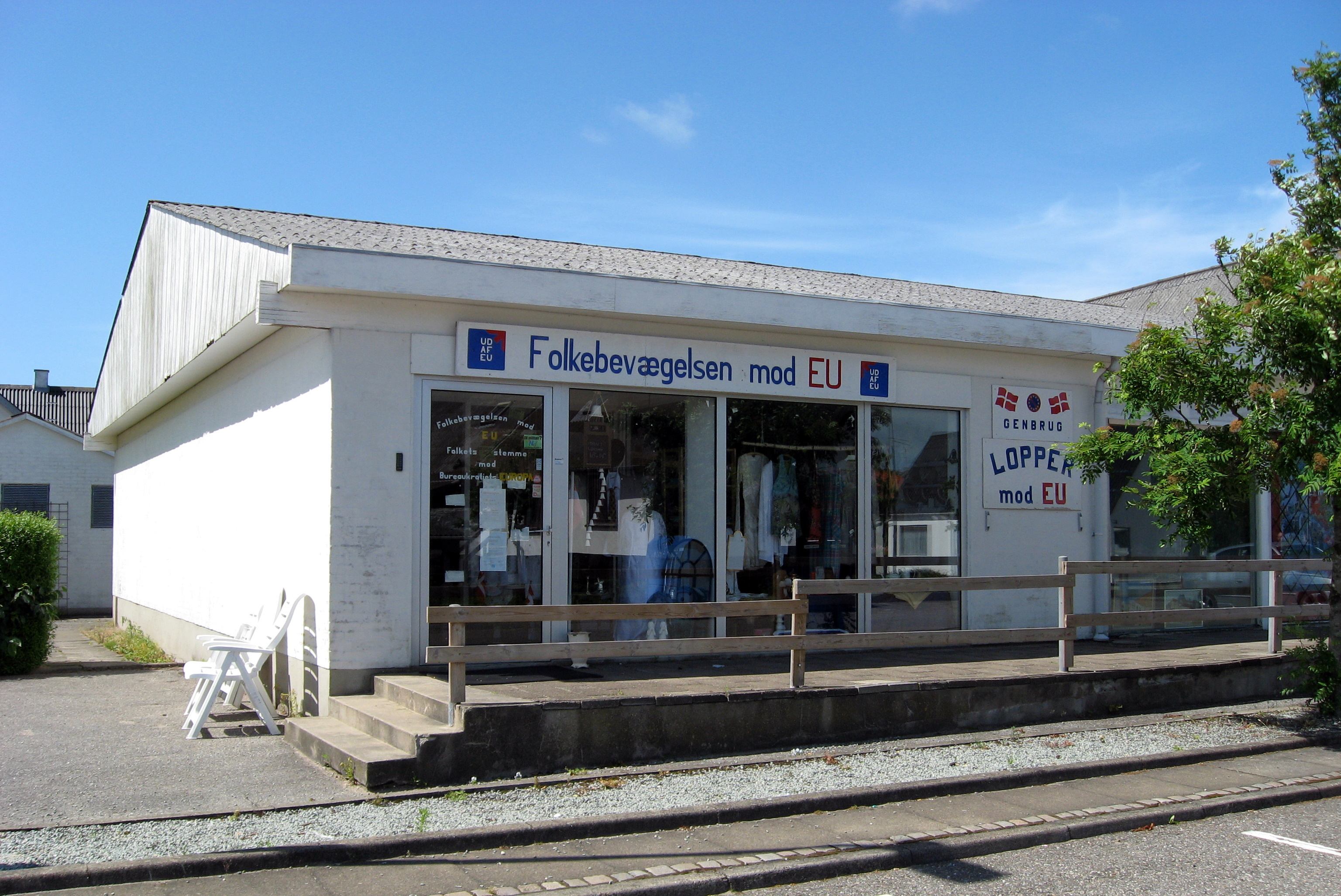 Folkebevægelsen mod EU, Kås, Jammerbugt Kommune